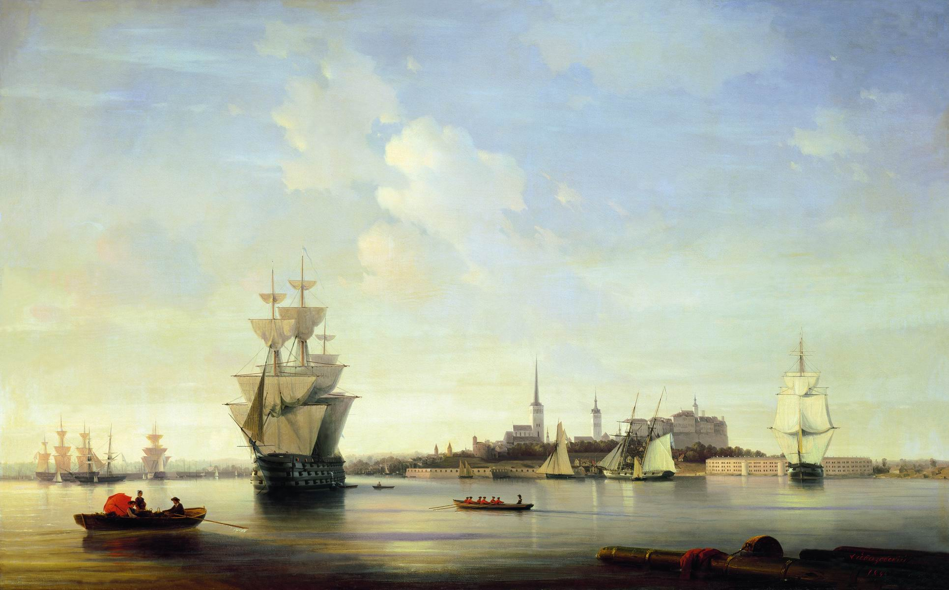 Ревель. 1844 Холст, масло. 118х188см. Центральный военно-морской музей, Санкт-Петербург